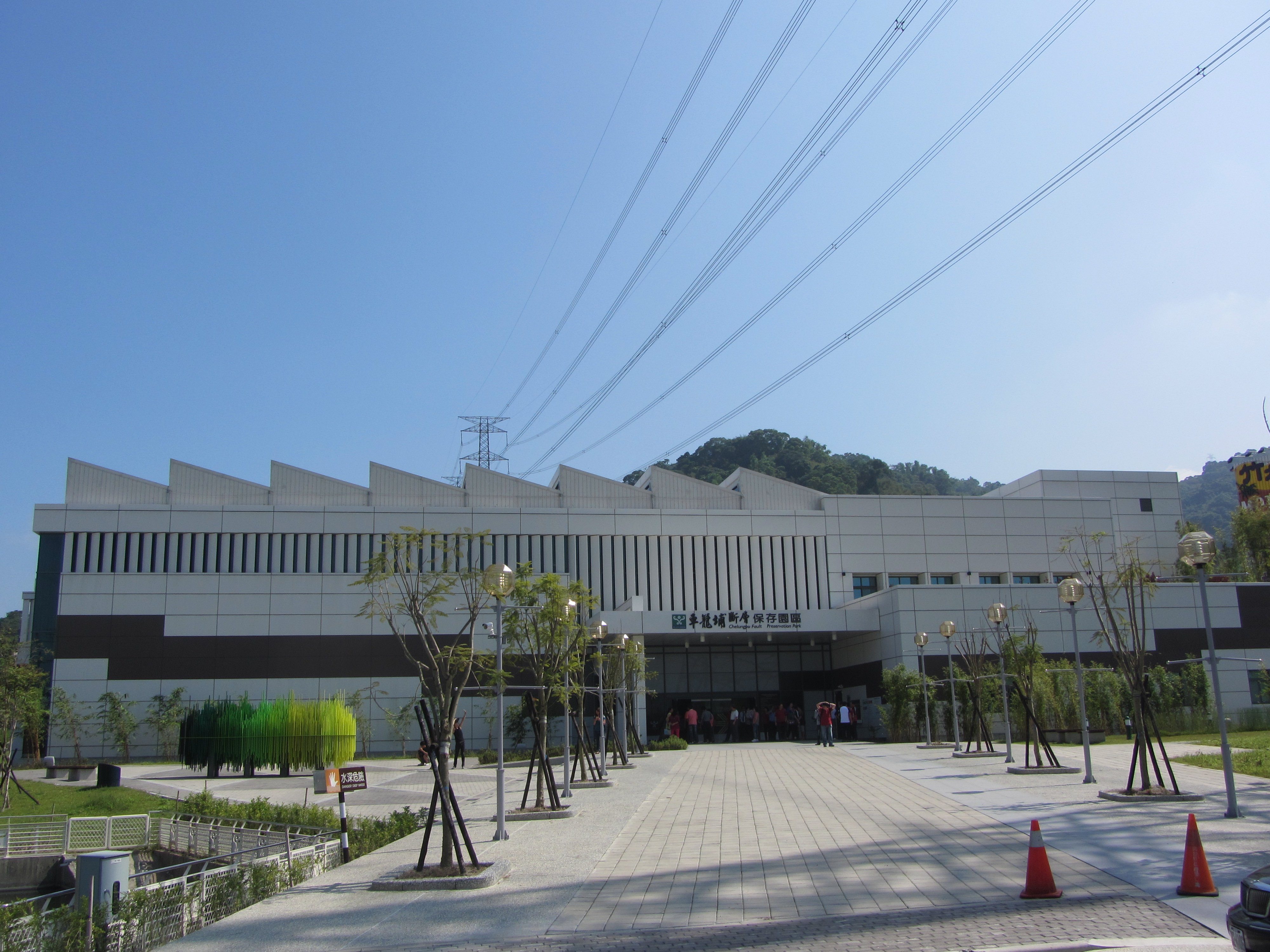 國立自然科學博物館車籠埔斷層保存園區